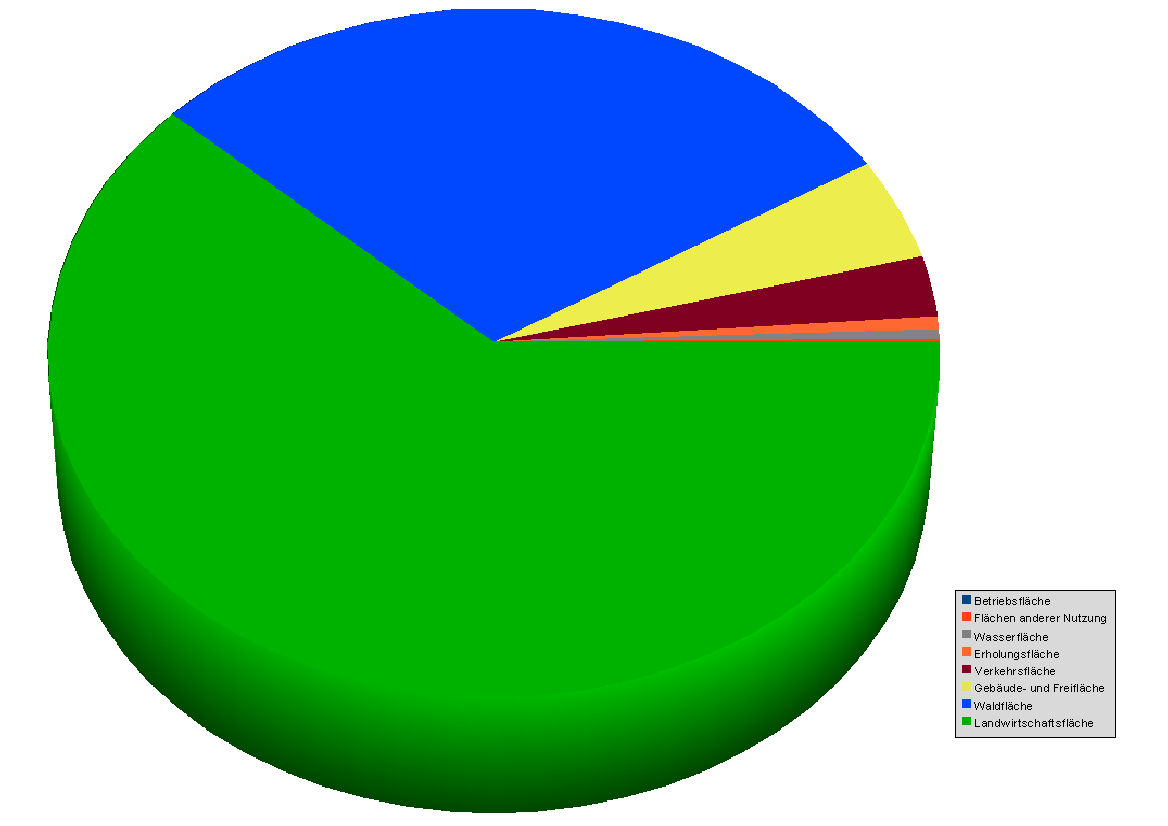 Diagramm der Flächenverteilung der Gemeinde Wiggensbach vom 31. Dezember 2004 (erstellt mit 2.3)